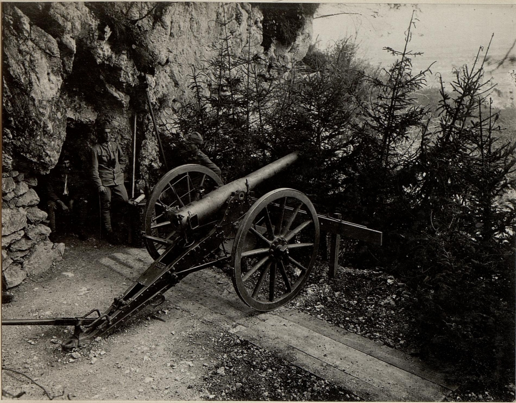 9 cm Positions Batterie M. 75 des k.u.k. Festungs Artillerie Regiments Nro. 2/14 am JAVORCEK. Aufgen.am 12.VIII. 1916.